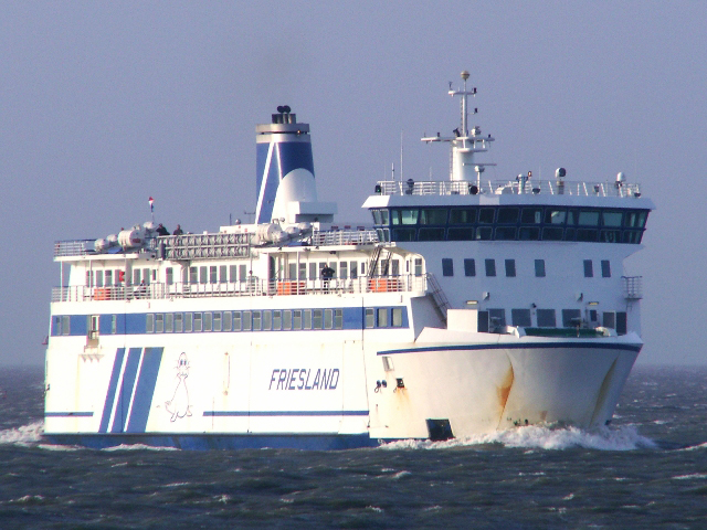 MS Friesland voor de haven van Harlingen